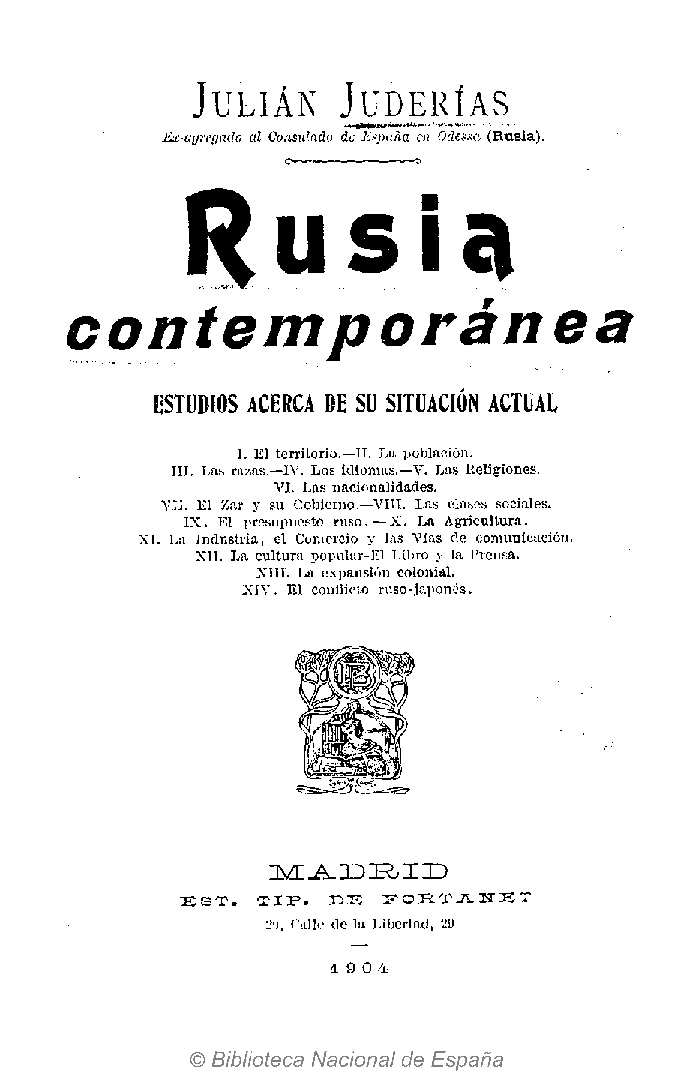 Rusia contemporánea : estudios acerca de su situación actual por Julián Juderías Autor: Juderías, Julián (1877-1918) Fecha: 1904 Datos de edición:Madrid, Estab. Tip. de Fortanet